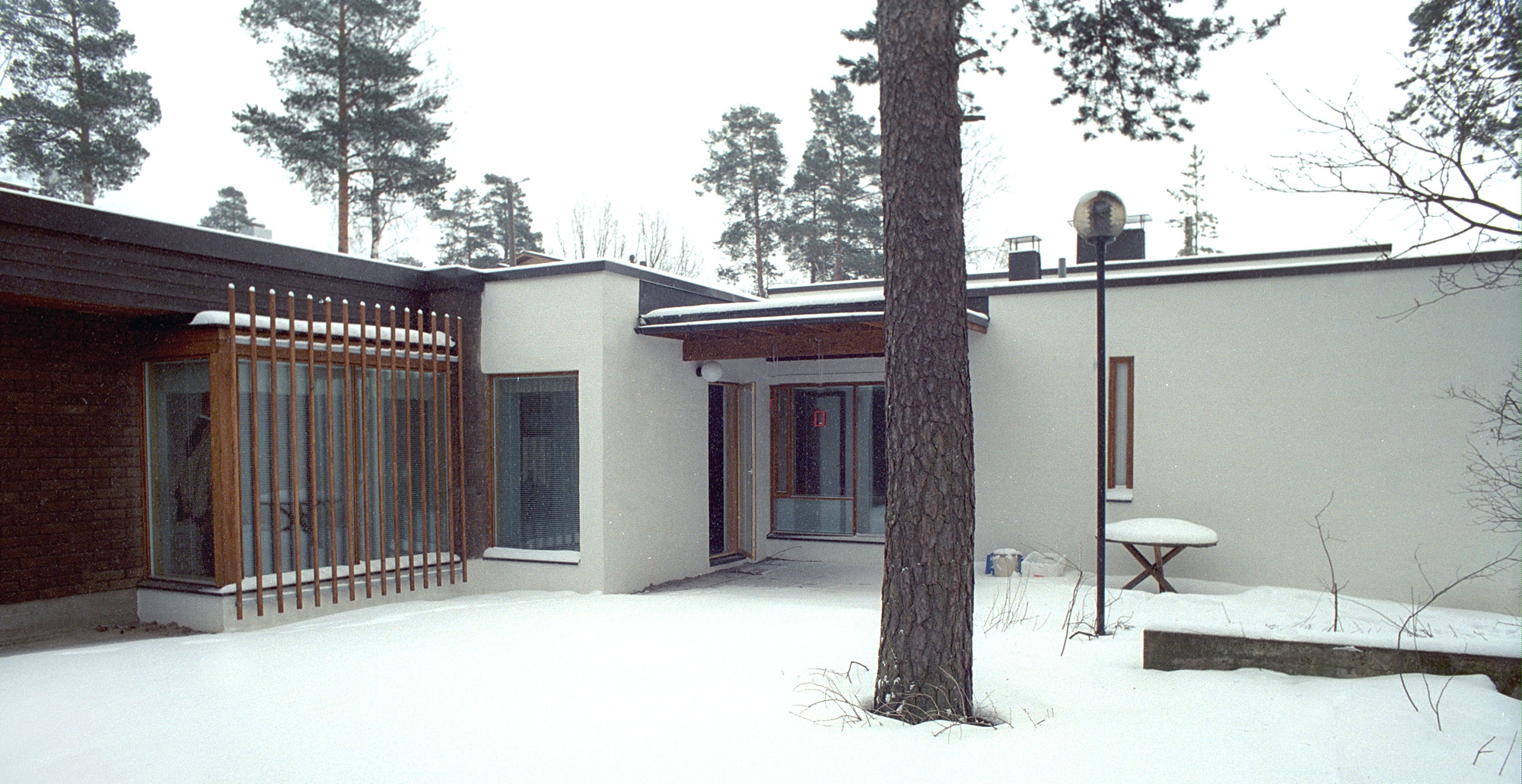 Helsingin ensikotiyhdistys on kansalais- ja lastensuojelujärjestö, joka auttaa tiivistä tukea tarvitsevia vauvaperheitä ja heidän läheisiään.